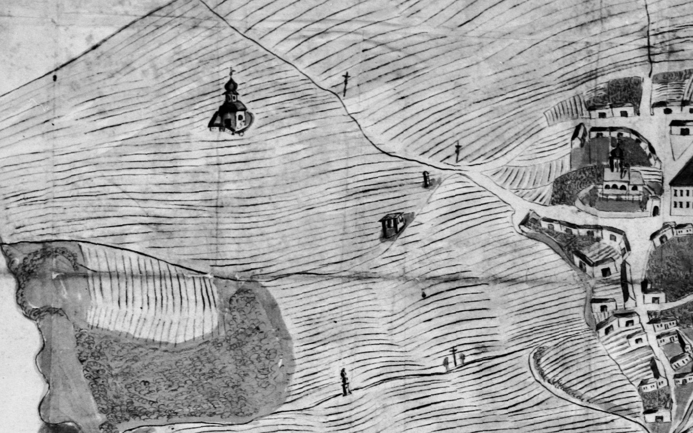 Výřez veduty Příbora od Karla Ludvíka Chrámka z roku 1728. Ve výřezu jsou vyobrazeny kaple sv. Marka při cestě do dnešního Prchalova, kříže, boží muka, na jihu socha sv. Jana a napravo kostel sv. Valentina.